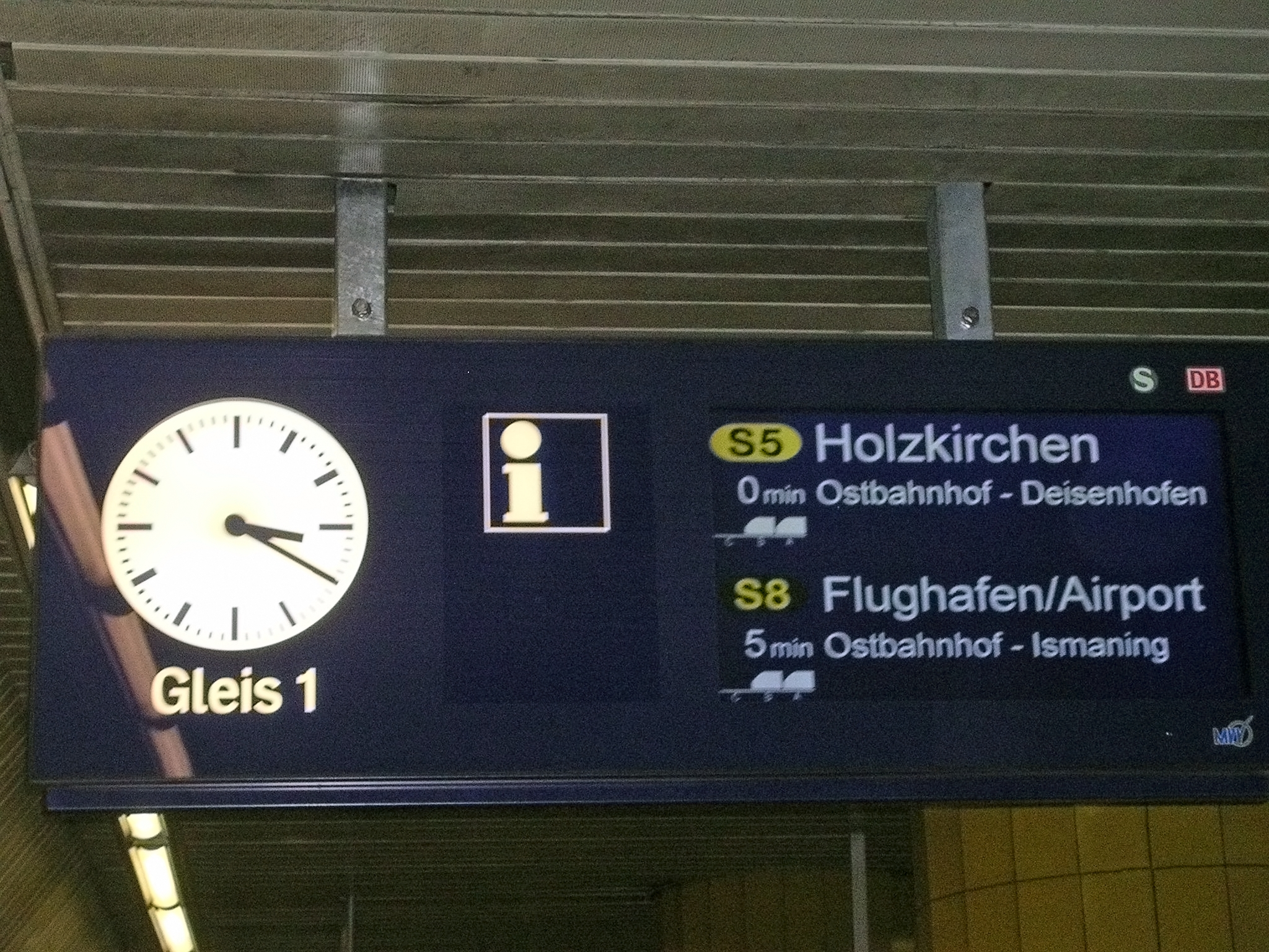 Munich S-Bahn "Zugzielanzeiger"